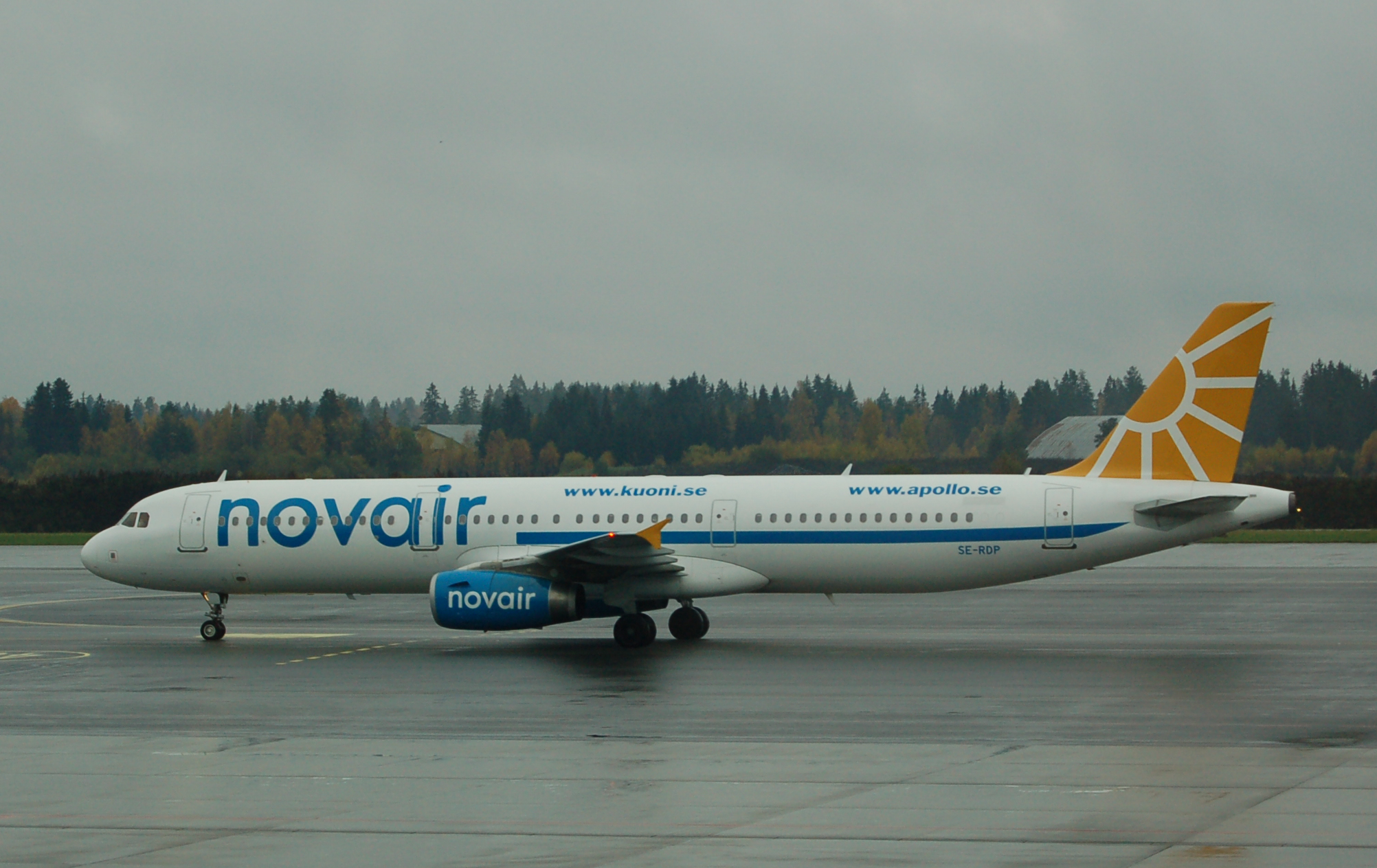 Novair A321-200 at Oslo Airport, Gardermoen.